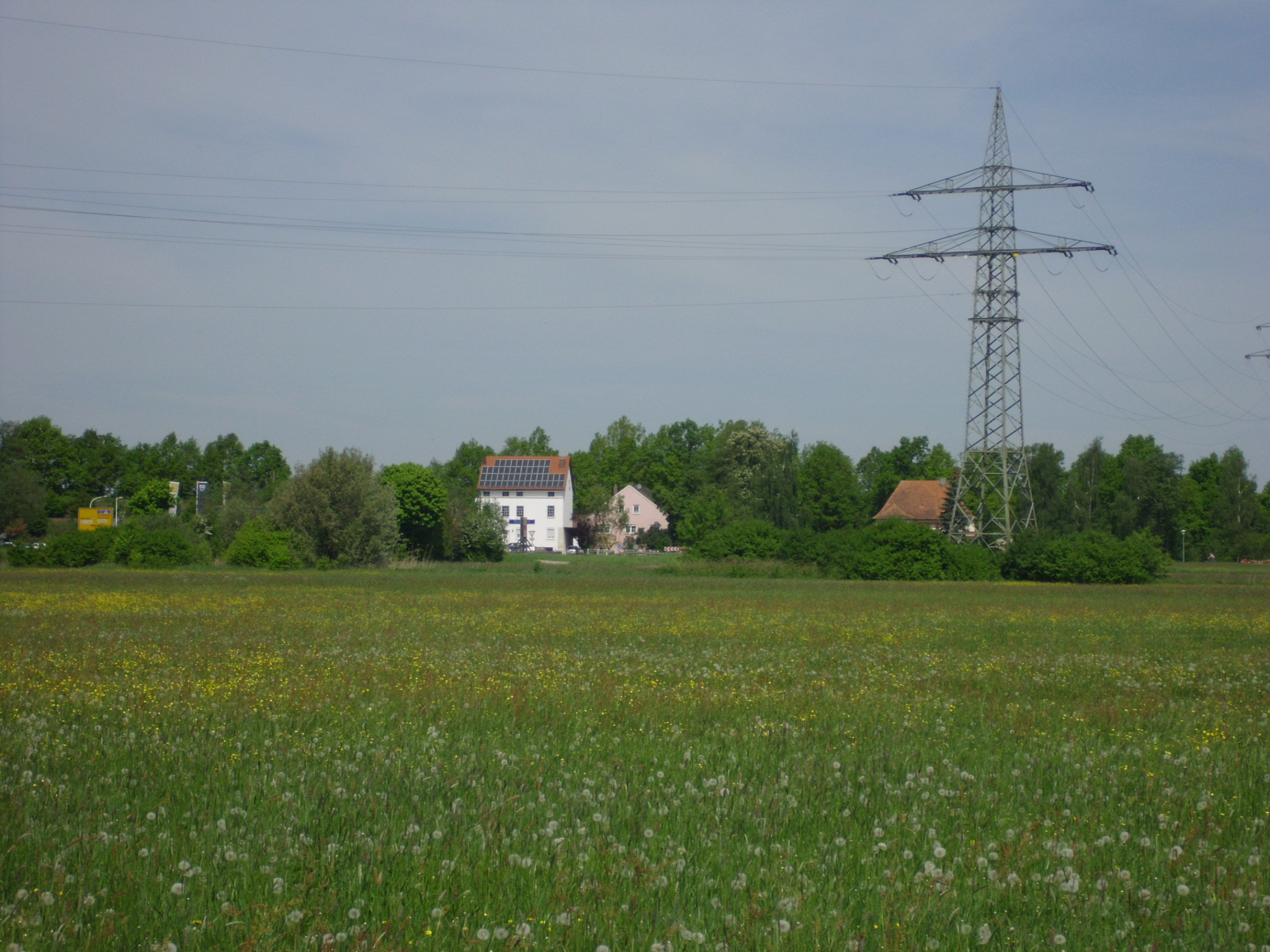 Scheupeleinsmühle, Ortsteil von Gunzenhausen im mittelfränkischen Landkreis Weißenburg-Gunzenhausen